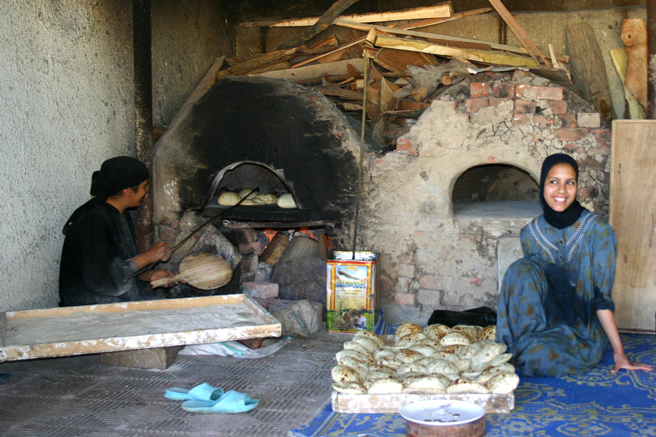 Des jeunes filles préparent du pain - Egypte Young ladies preparing bread - Egypt Picture made by Bradipus